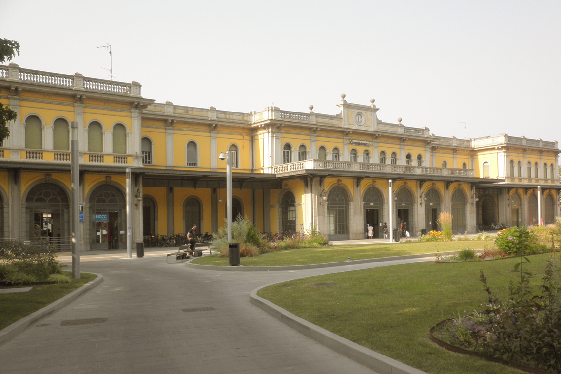 La stazione ferroviaria di Cremona